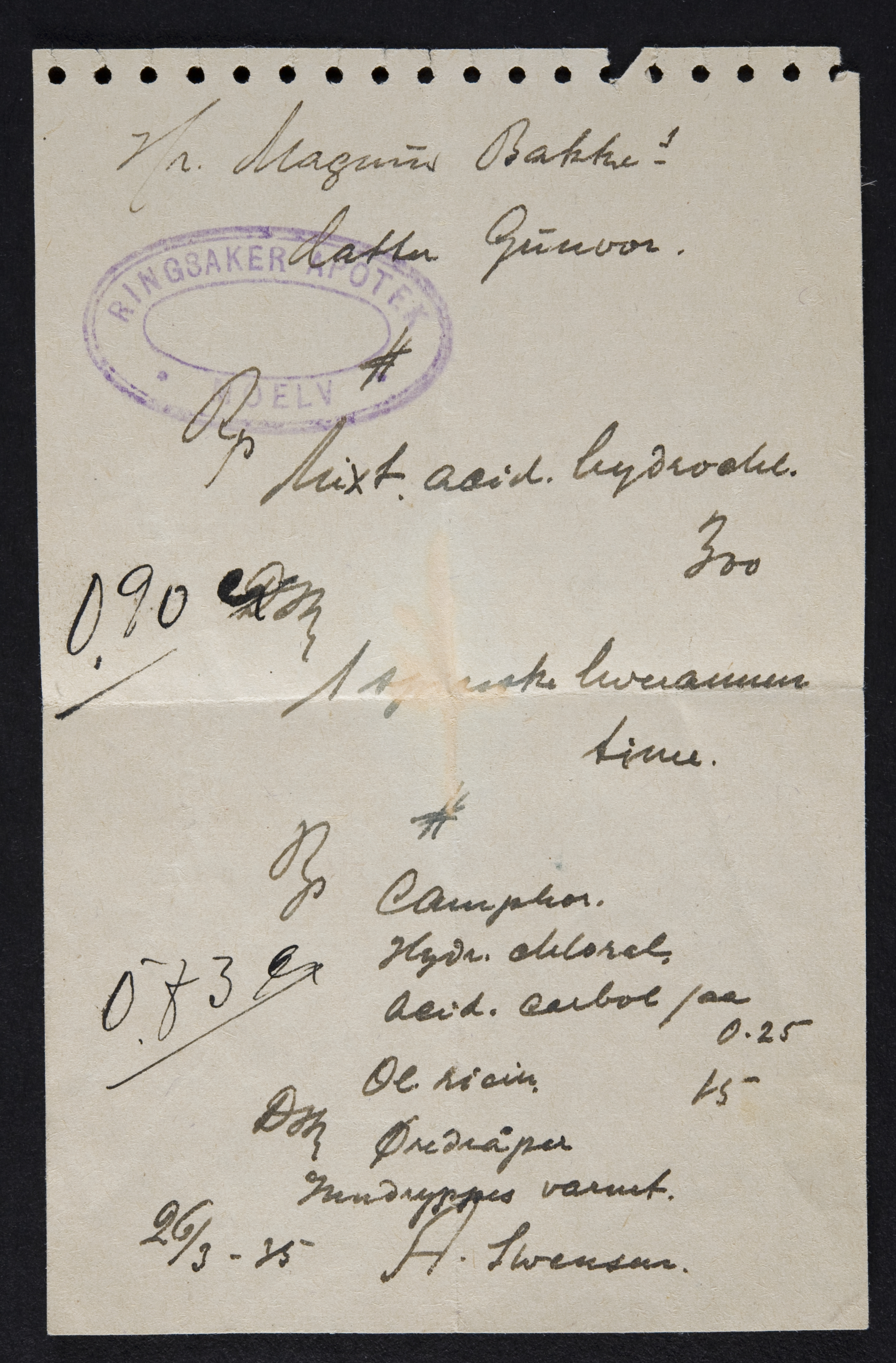 Håndskrevet resept på hvitt papir i konvolutt, utskrevet i 1935 av A. Swensen i Moelv, Ringsaker.